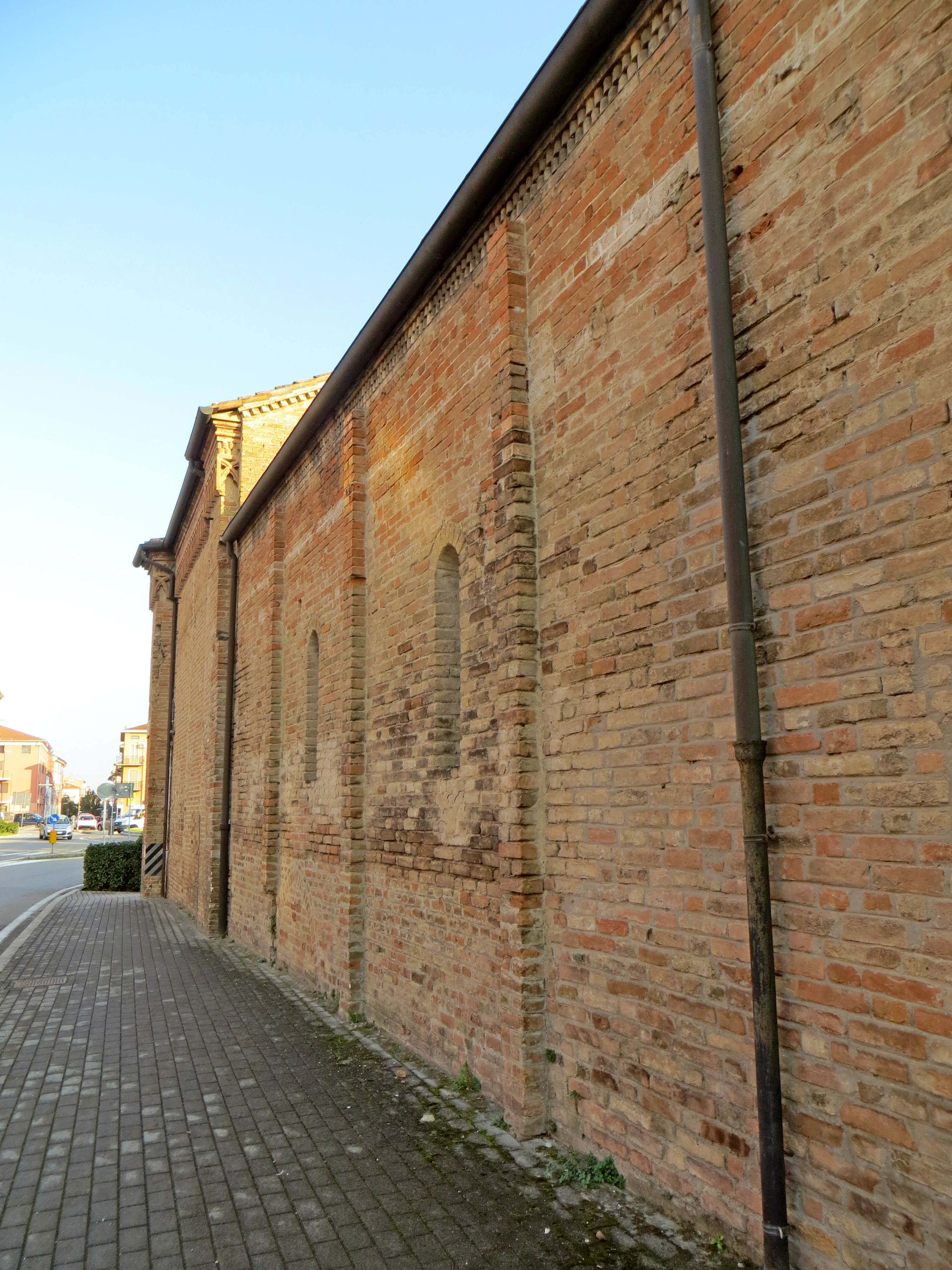 Chiesa di Sant'Antonio Abate (Fidenza) - lato nord